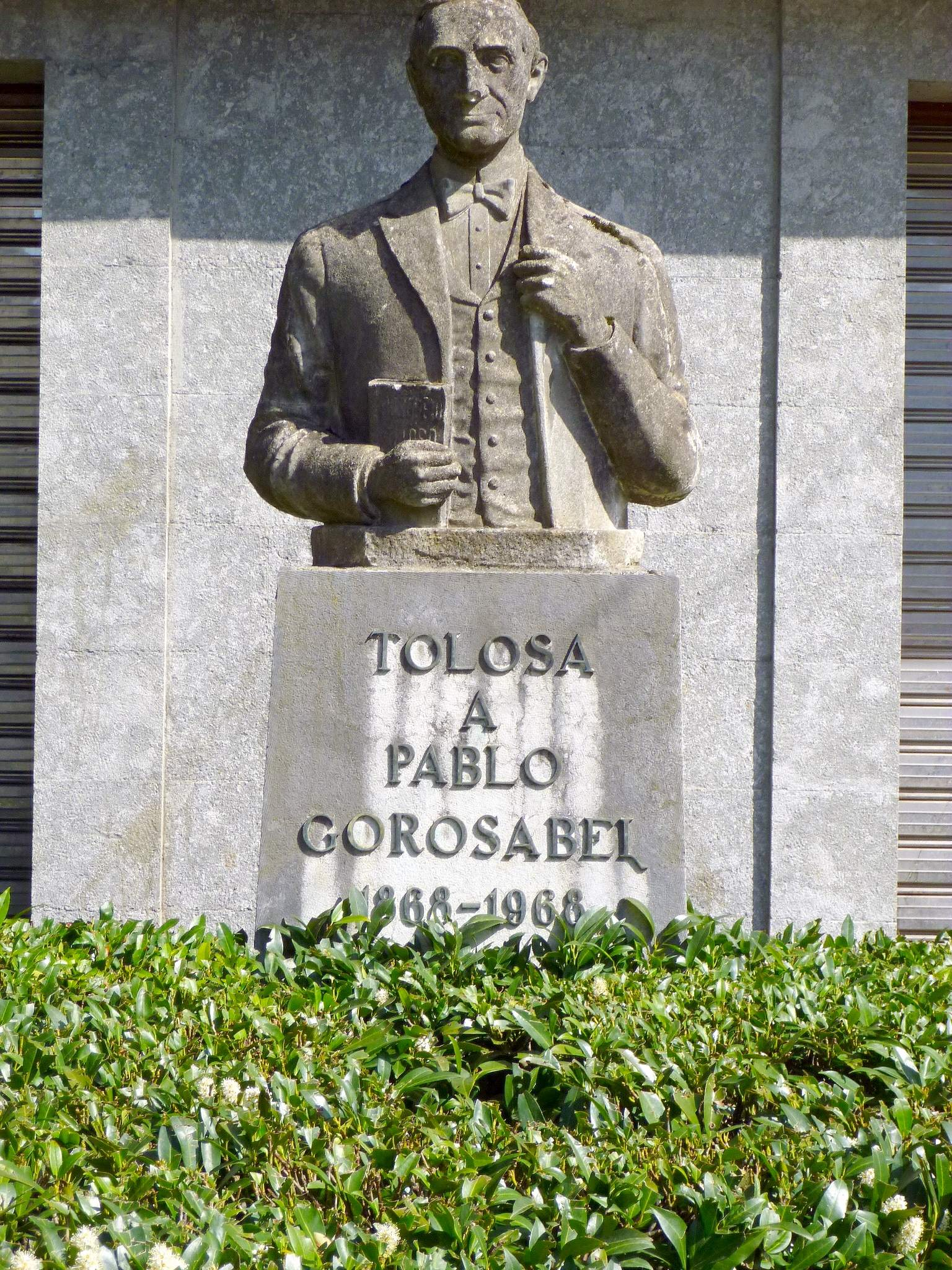 Monumento a Pablo Gorosabel (Tolosa)